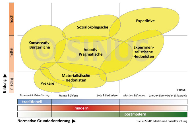 SINUS-Modell für die Lebenswelten der 14-17-Jährigen. Das Modell verdichtet die soziokulturelle Vielfalt der jugendlichen Lebenswelten in Deutschland. (vgl. Sinus-Milieus). Um den postmodernen Wertesynthesen im Lebensweltenmodell grafisch Rechnung zu tragen, sind die zentralen Wertorientierungen (traditionell, modern, postmodern) mit heller und dunkler werdenden Farbverläufen hinterlegt. So wird bildlich erkennbar, dass sich "Wertefelder" überlappen.